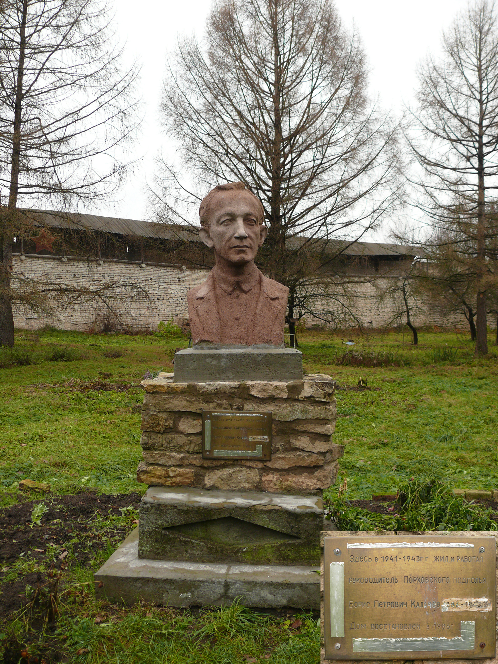 Памятник Борису Петровичу Калачёву - руководитель порховского подполья. Порховская крепость, Порхов, Псковская область